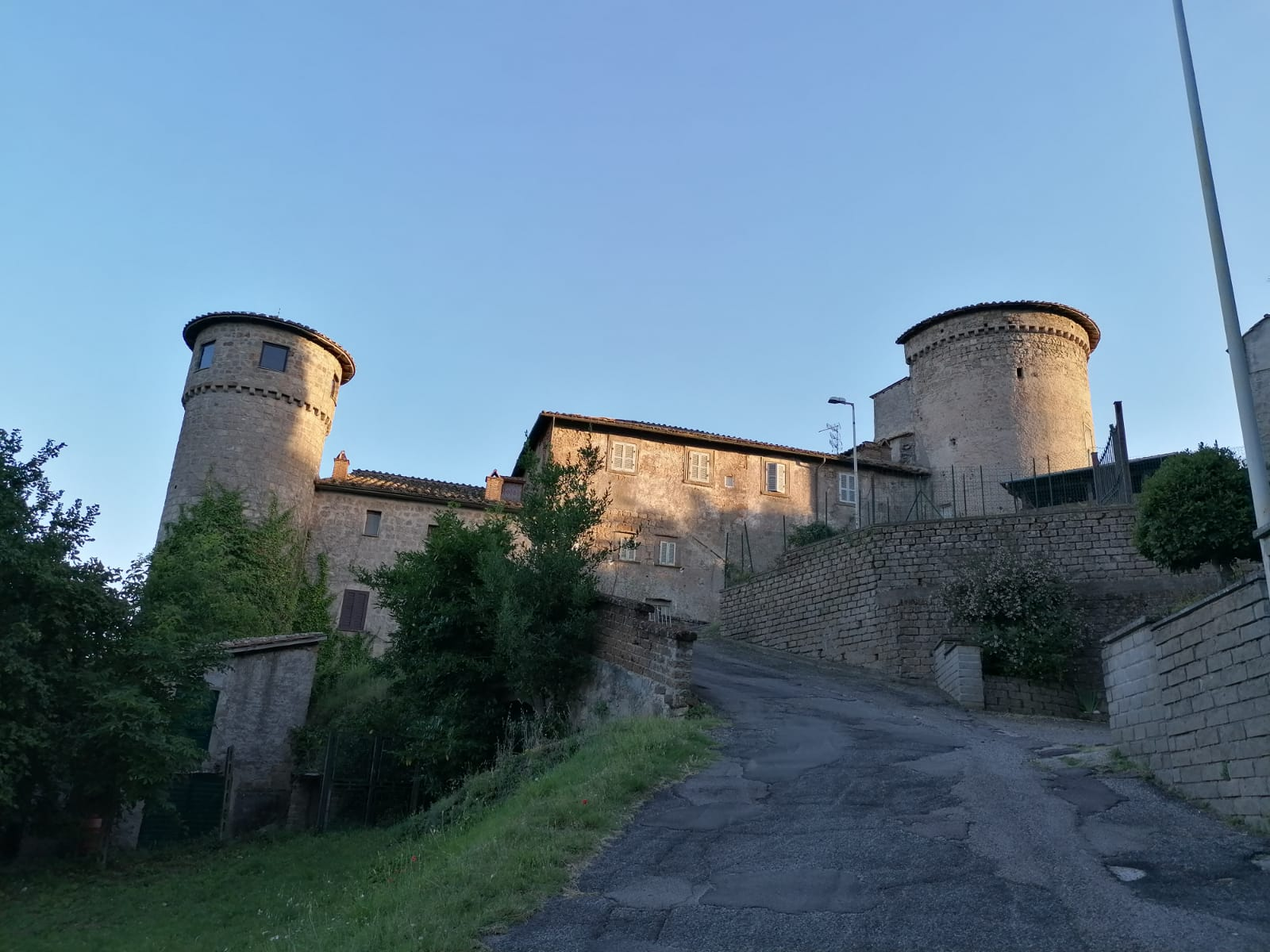 Castello costruito dalla famiglia nobile italiana "Di Vico" situato a Canepina (VT)